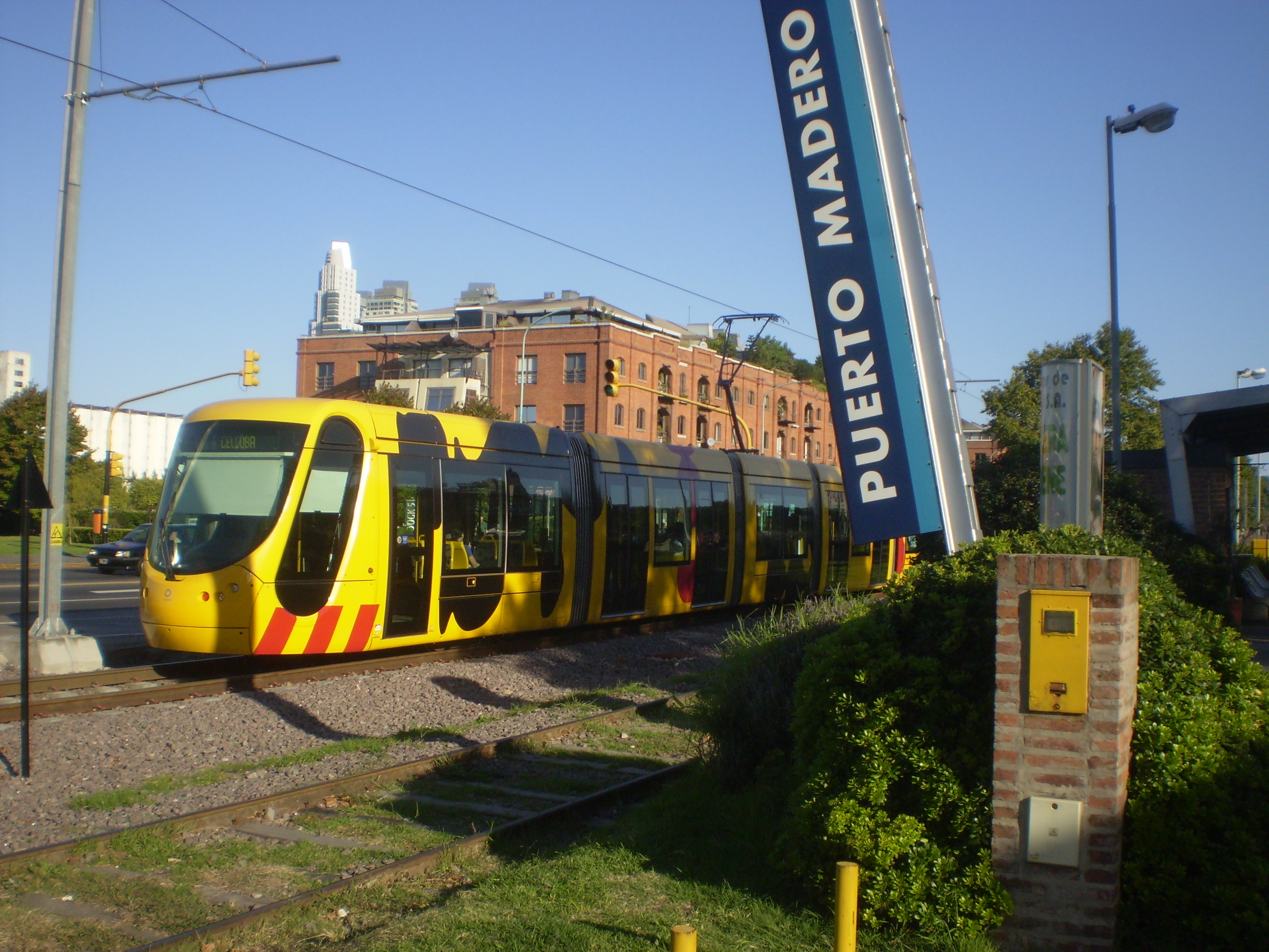 Tranvía de Puerto Madero